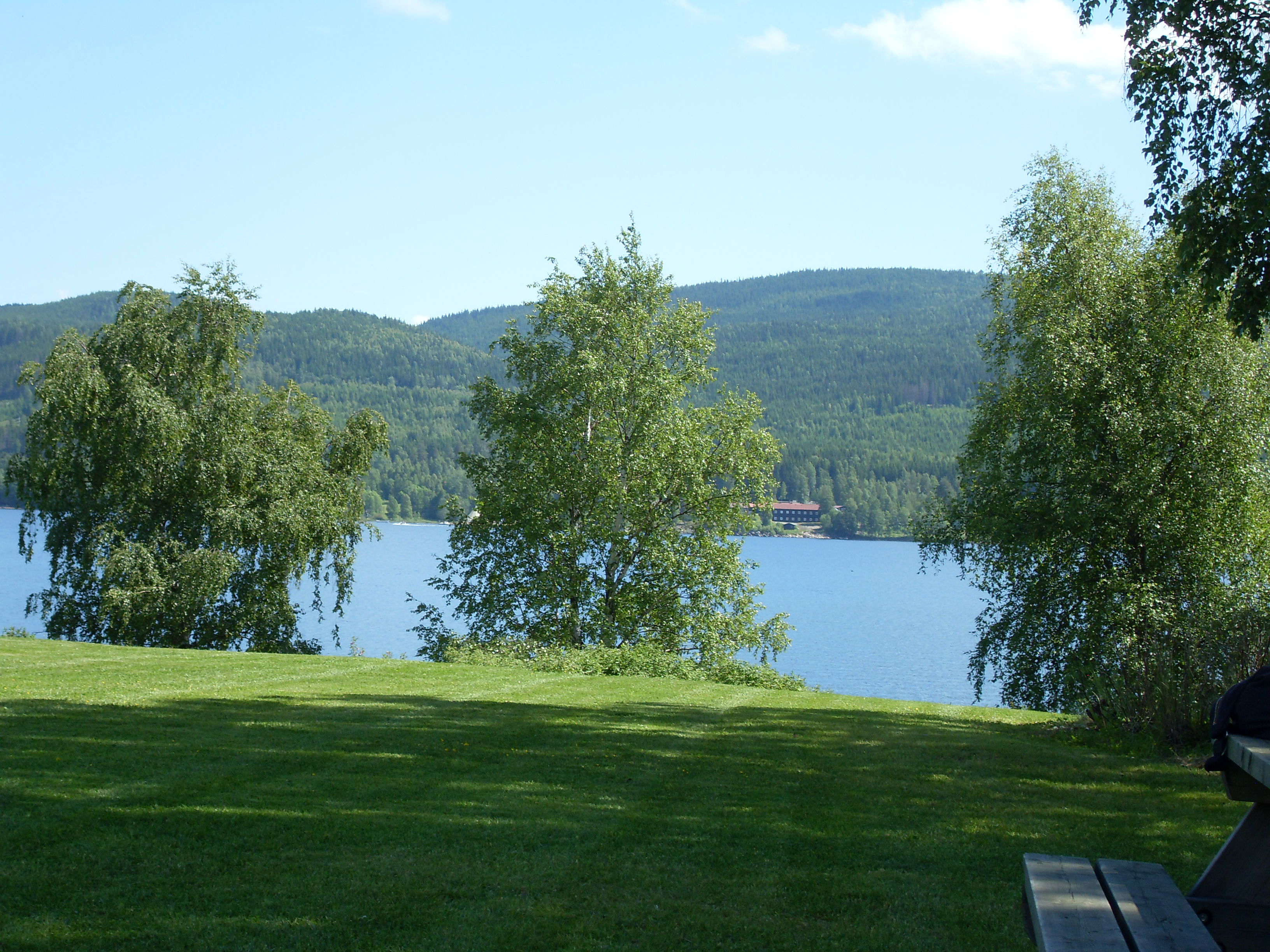 Jezioro Hurdalssjøen w Norwegii